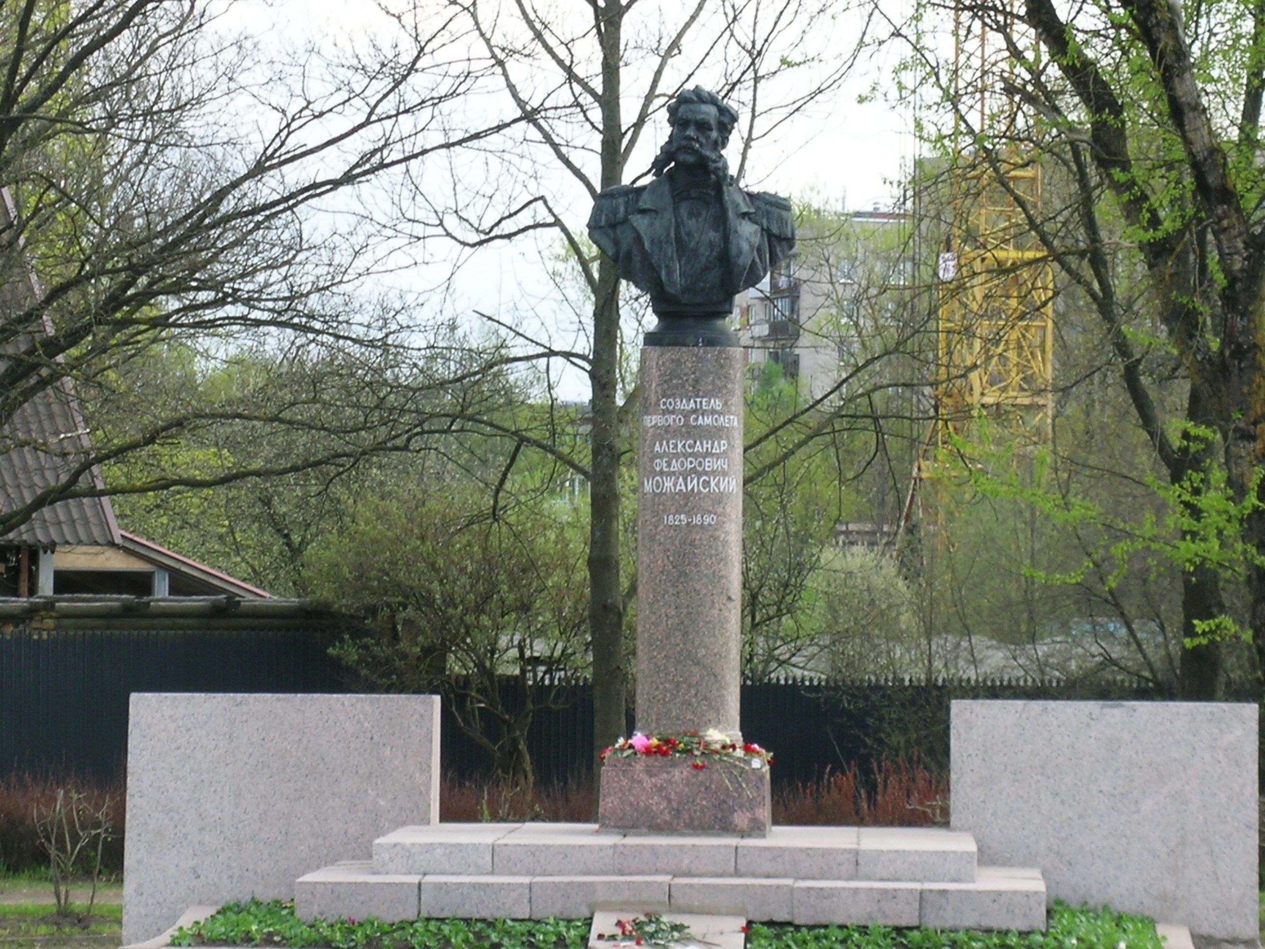 Бюст А. Ф. Можайского. Санкт-Петербург, Красносельский район, Красное Село. Надпись: Создатель первого самолёта Александр Фёдорович Можайский 1825—1890